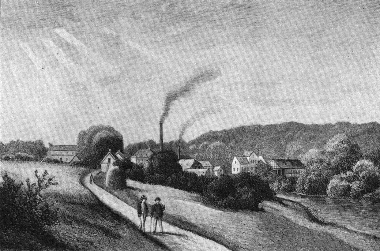 Ørholm Mølle var en vandmølle og tidligere krudtværk ved Mølleåen nord for København.